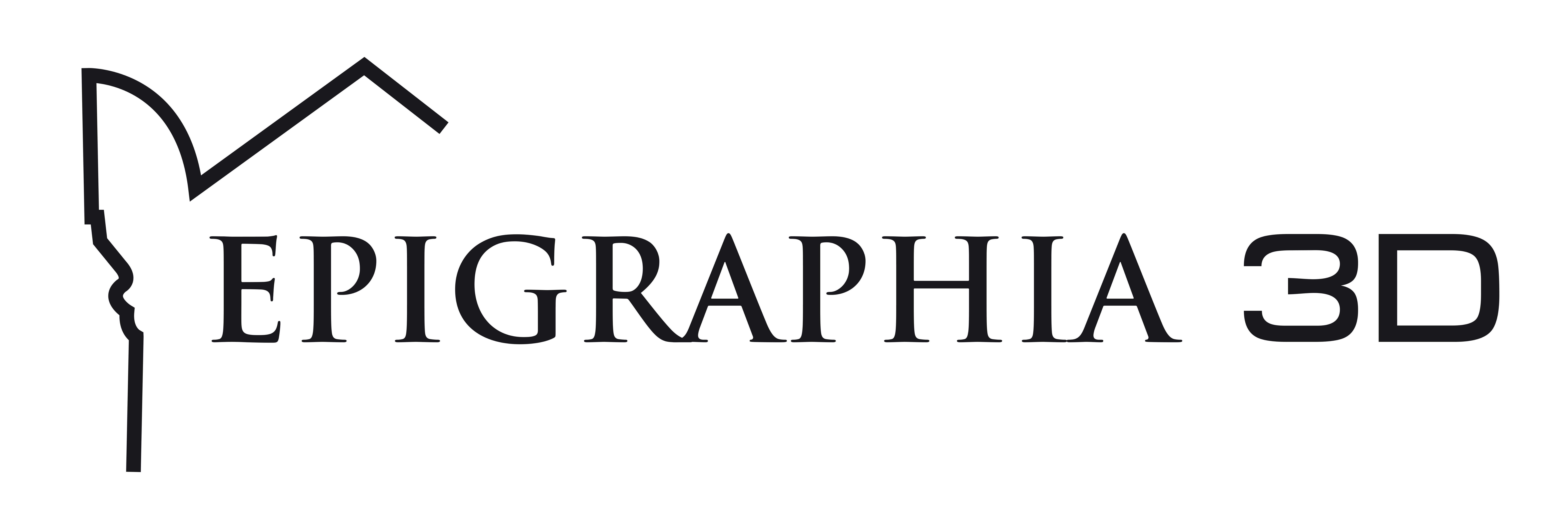 Logotipo del proyecto Epigraphia 3D.